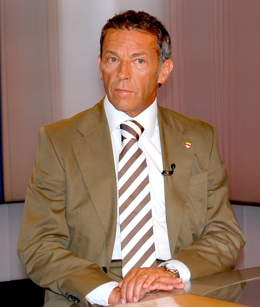 Jörg Haider während einer TV-Konfrontation zur Nationalratswahl 2008